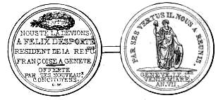 Médaille en or offerte par les citoyens de Genève à Félix Desportes le 3 octobre 1798.